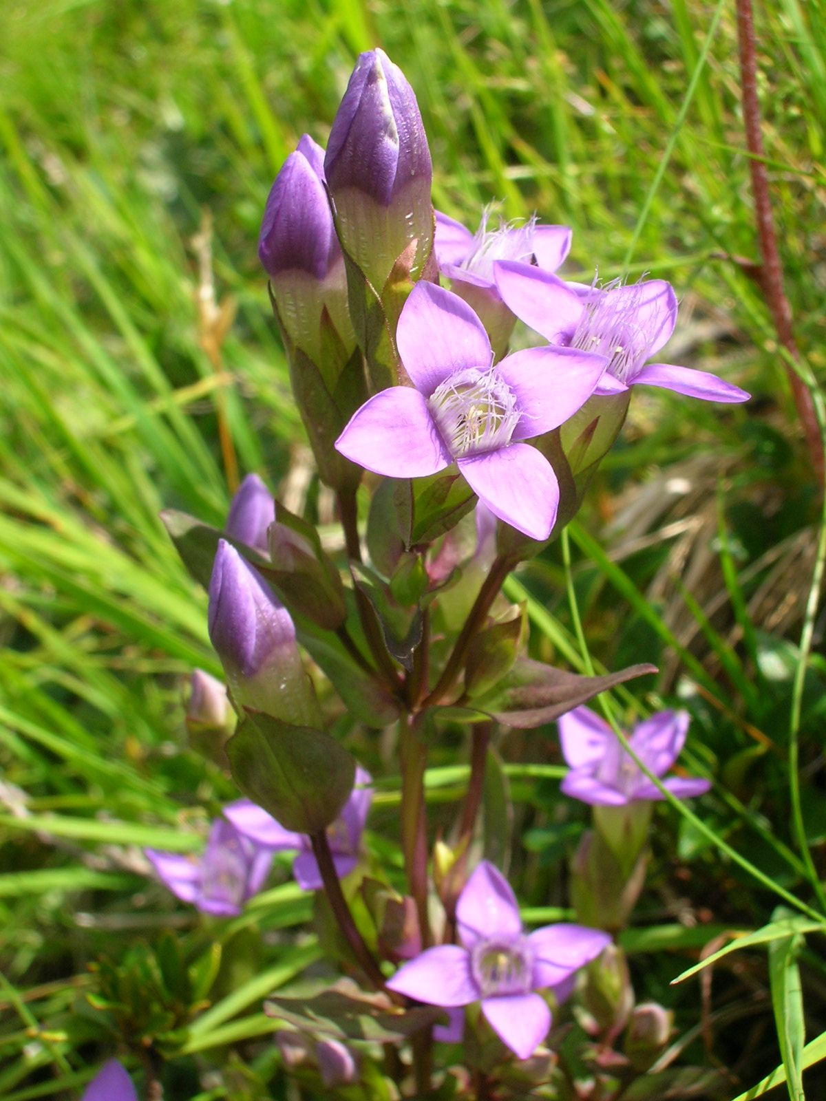 Gentianella campestris / Feld-Kleinenzian (Schweiz, Engadin, 2000 m ü M)